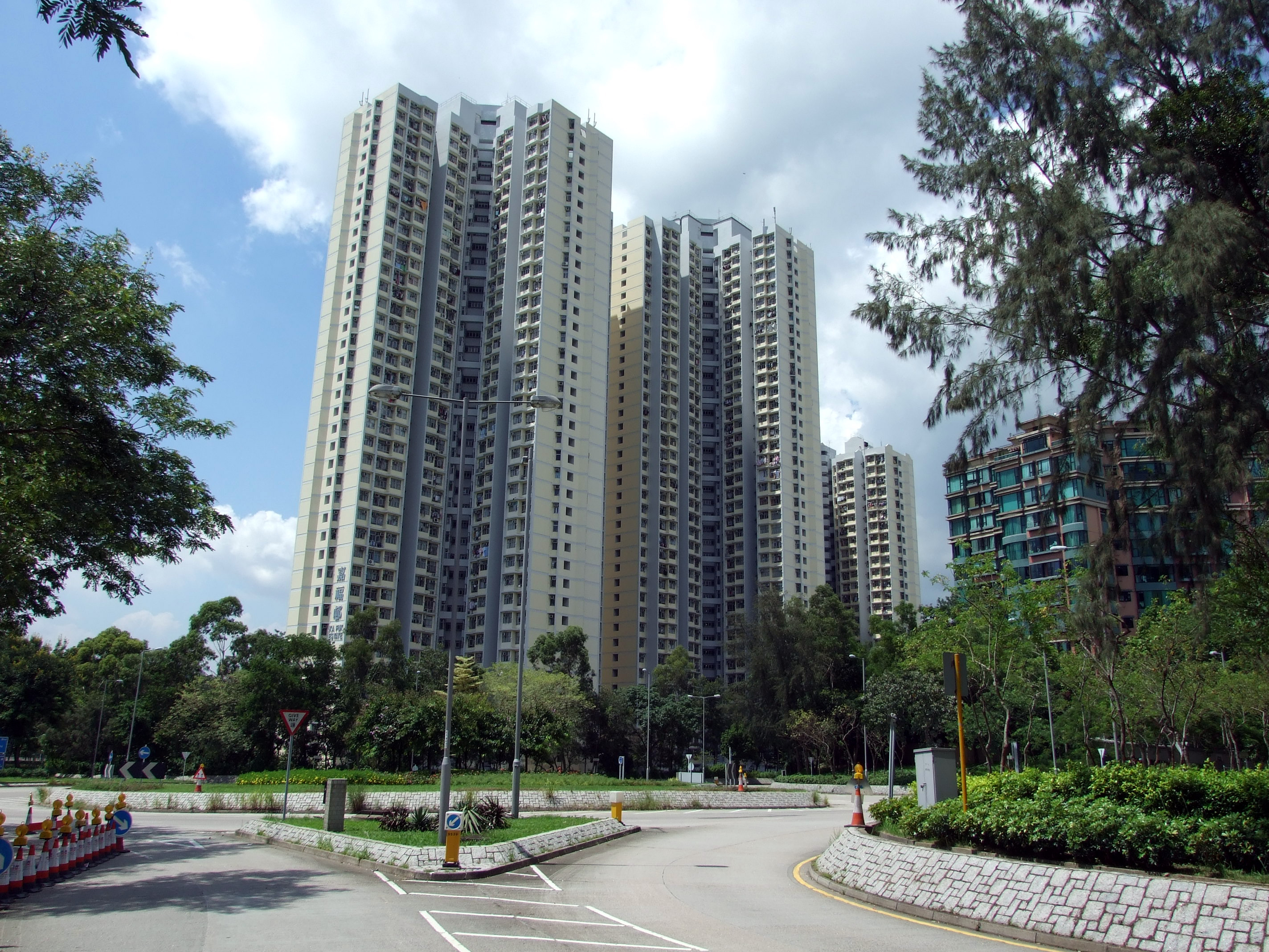 中文（香港）: 嘉福邨